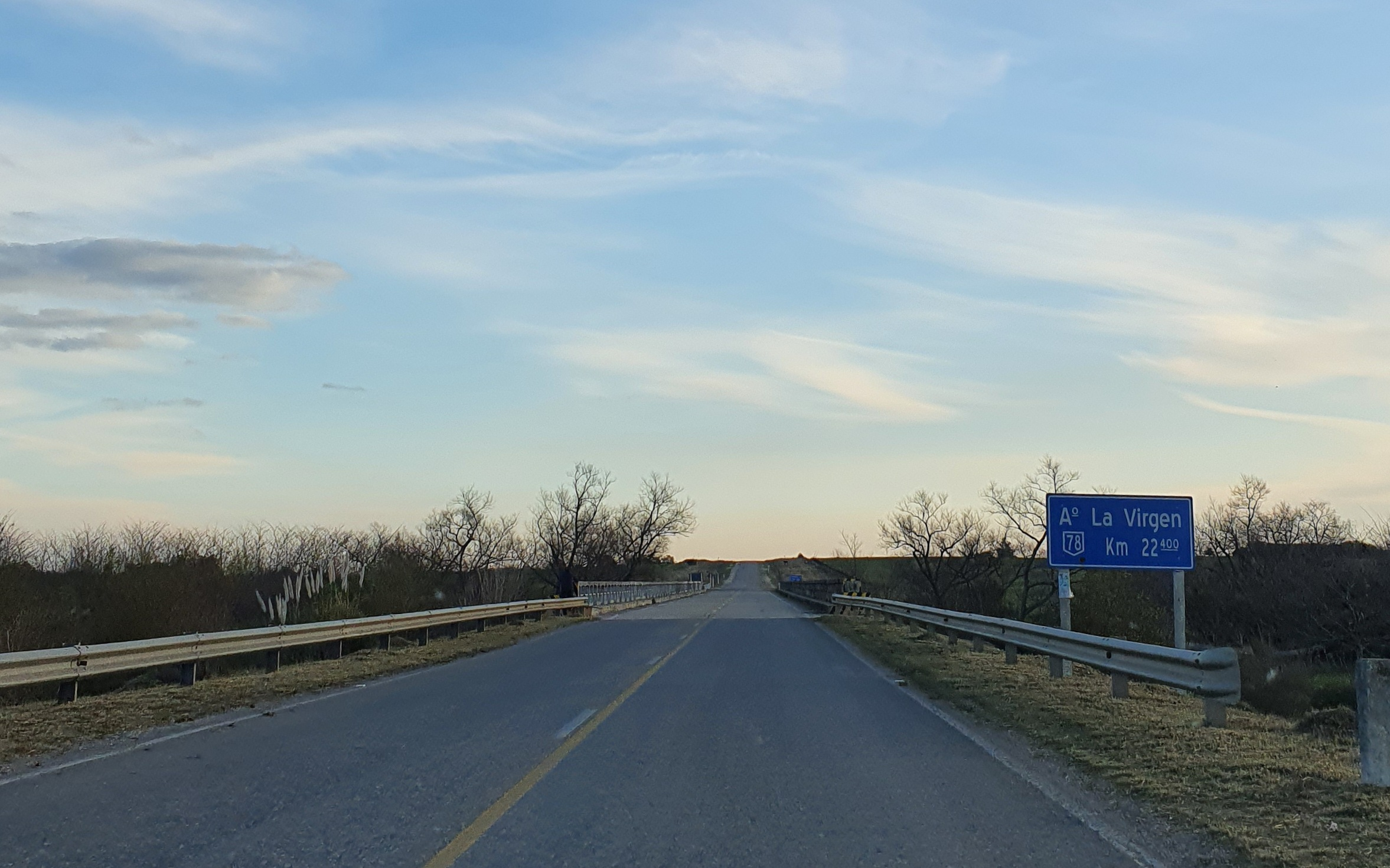 Ruta78 Arroyo de la Virgen, Uruguay